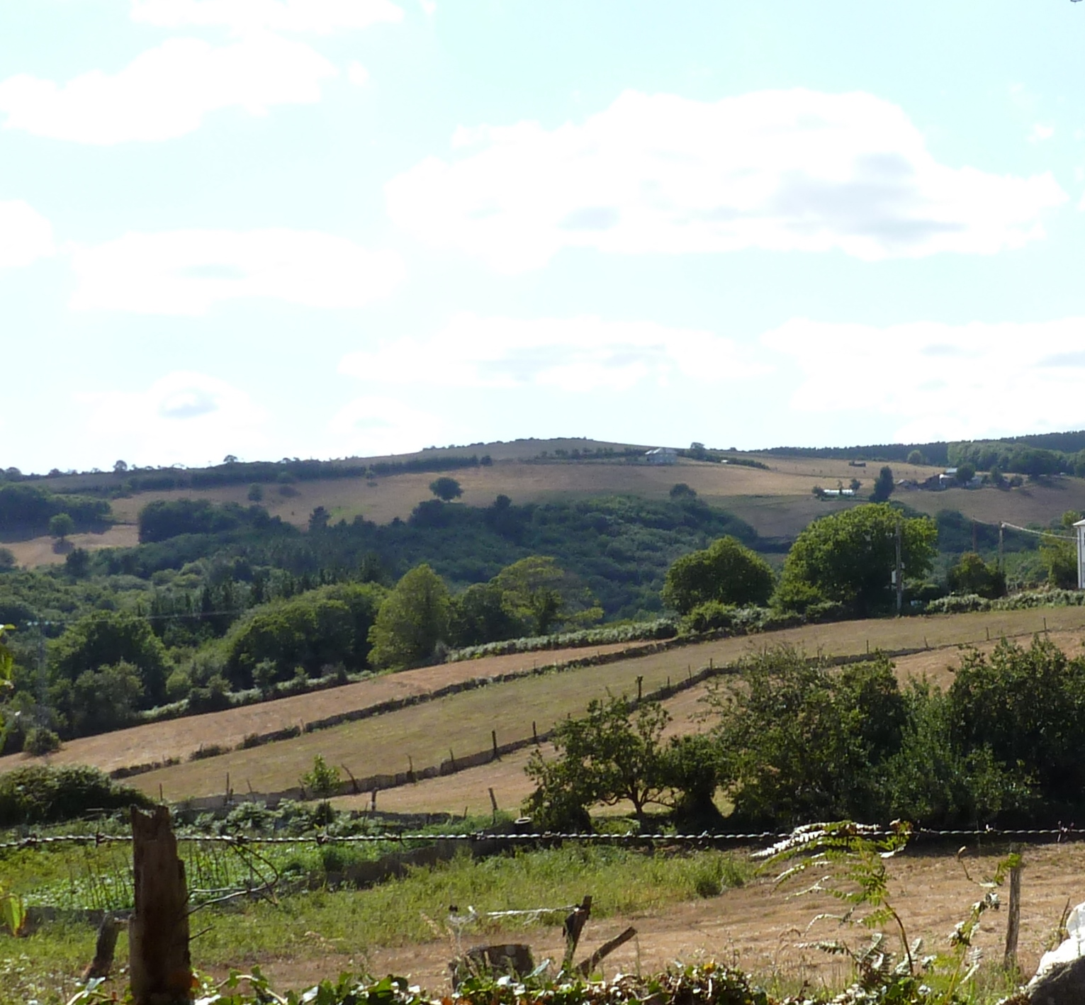 Lugar de Seixas, parroquia da Cervela, concello do Incio, Lugo